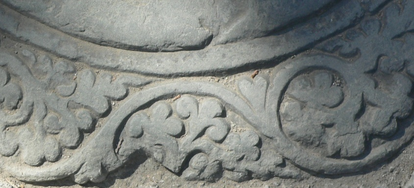 蔓草紋 拍攝